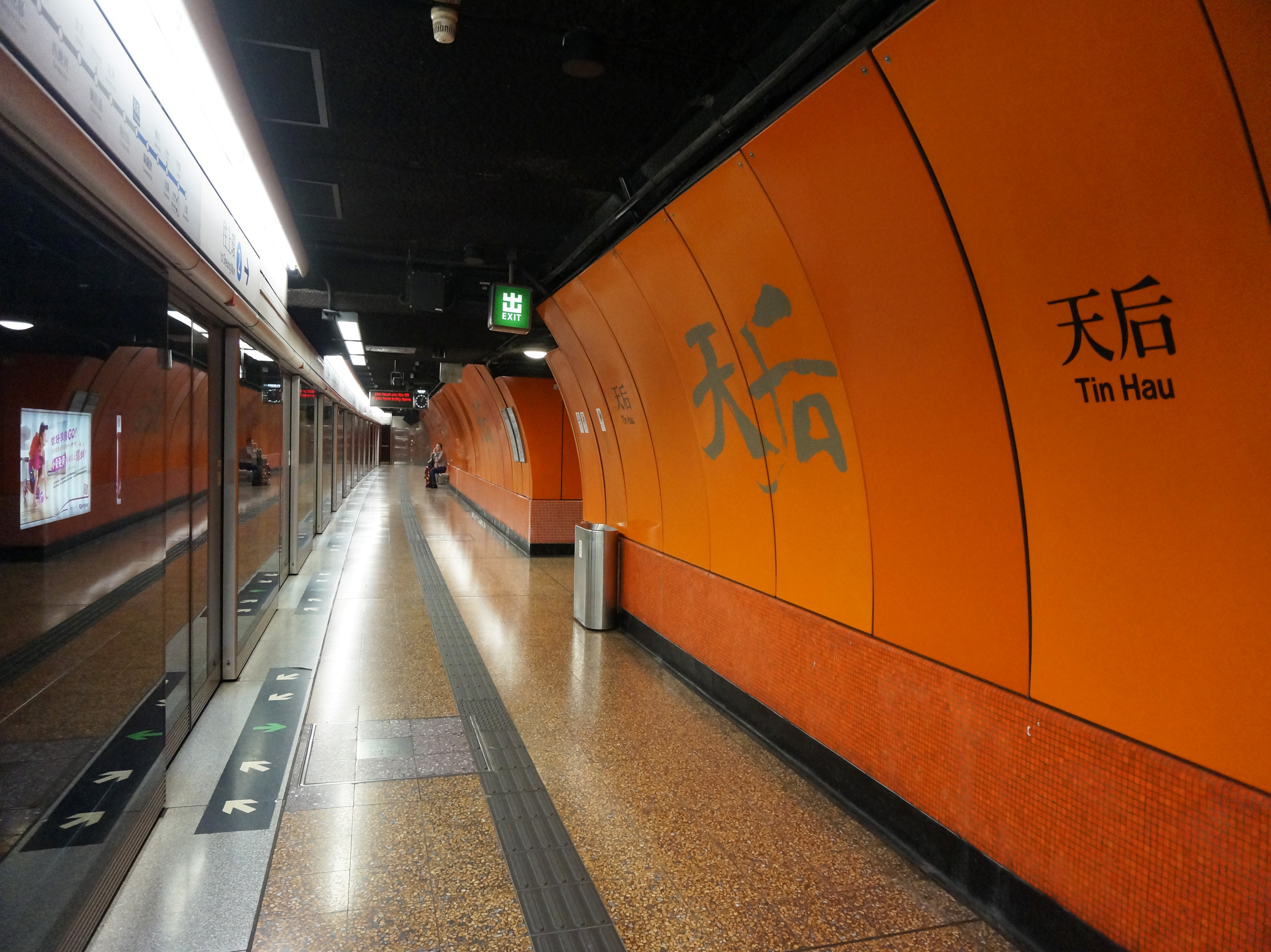 港鐵天后站月台